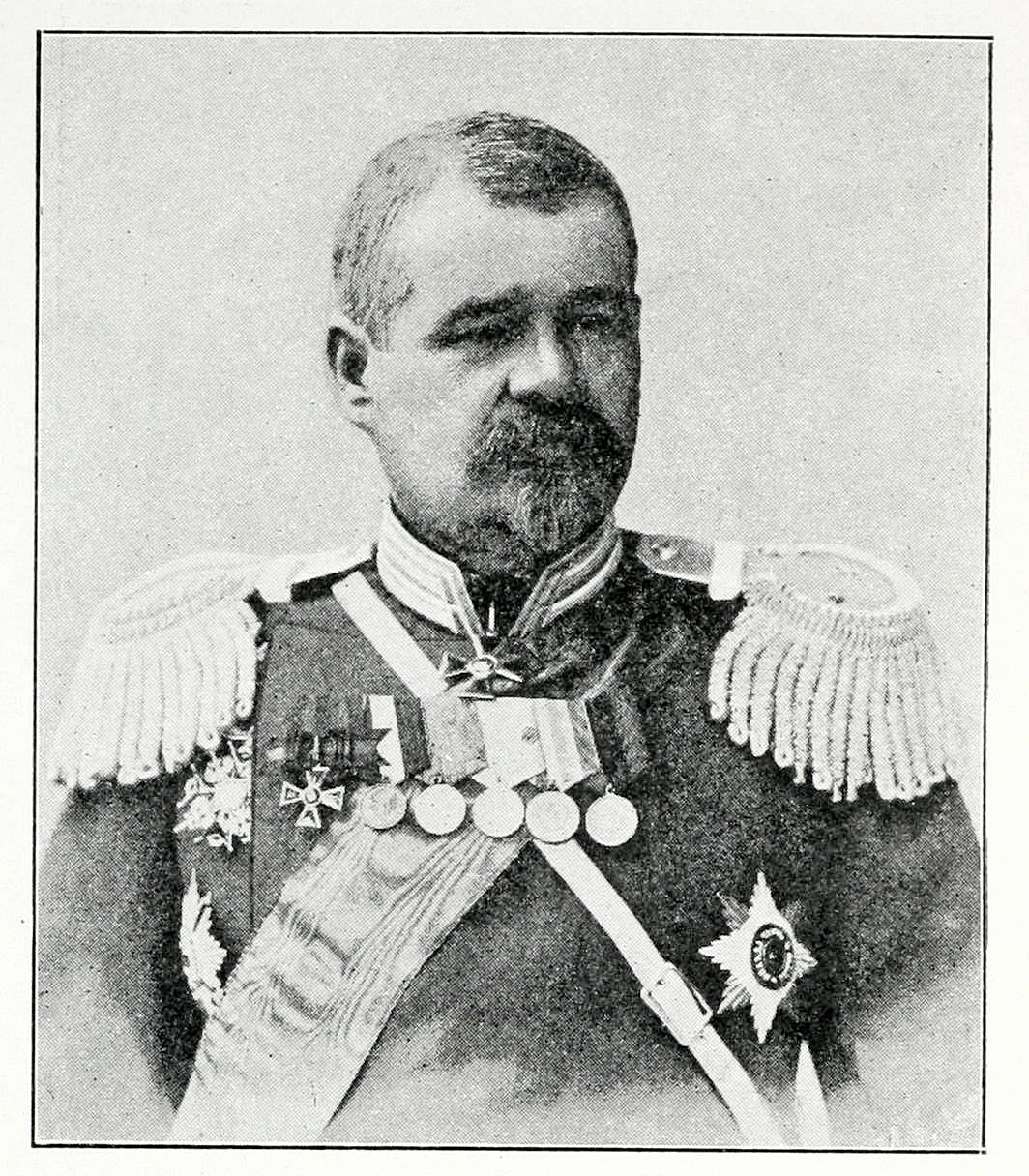 Это изо было использовано в статье «Губер, Константин Петрович» опубликованной в восьмом томе «Военной энциклопедии», который был издан книгоиздательским товариществом И. Д. Сытина в 1912 году в столице Российской империи городе Санкт-Петербурге.